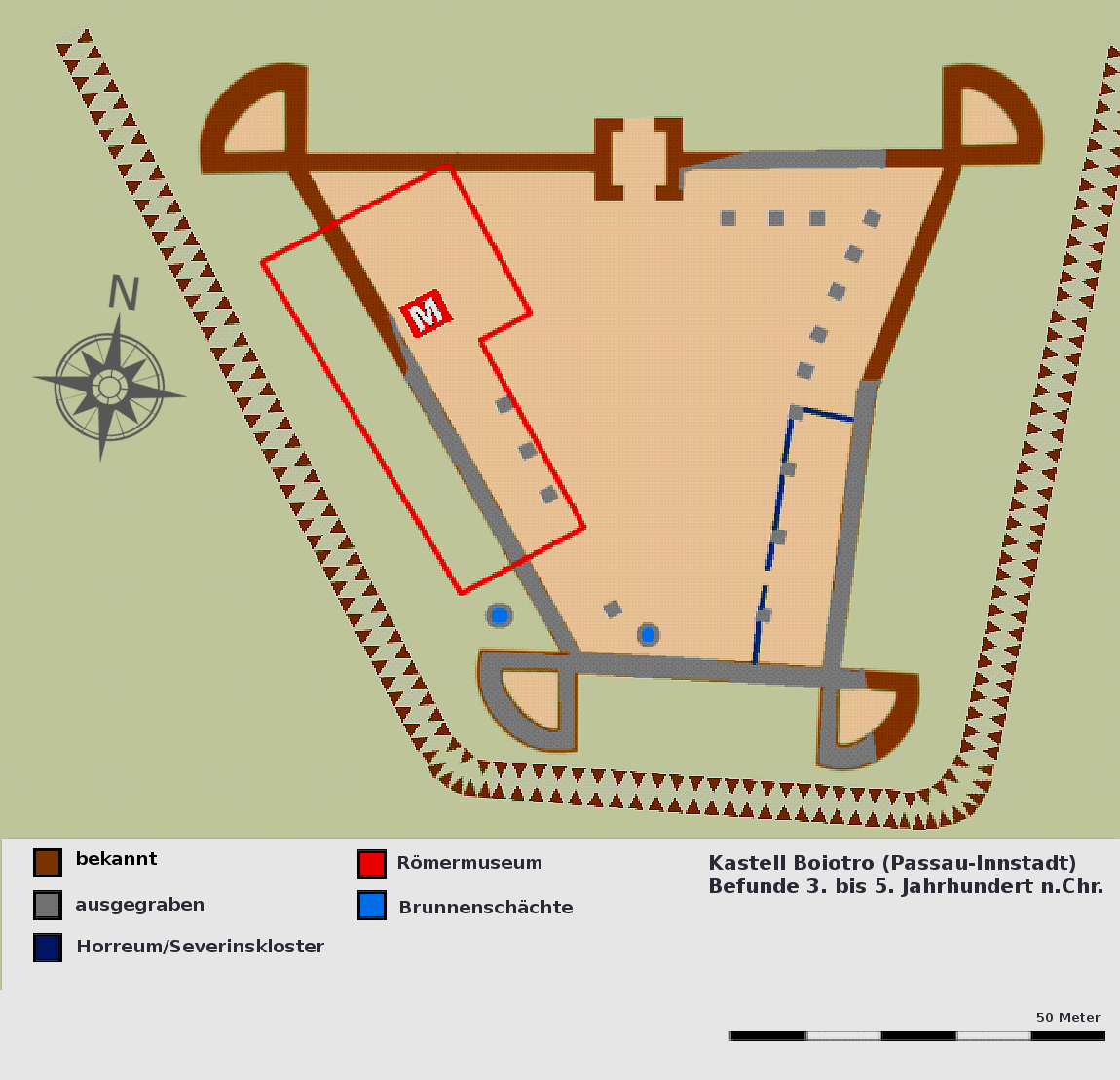 Befundskizze des spätantiken Kastell Boiotro/Passau Innstadt, 3. - 5. Jhdt.n.Chr.